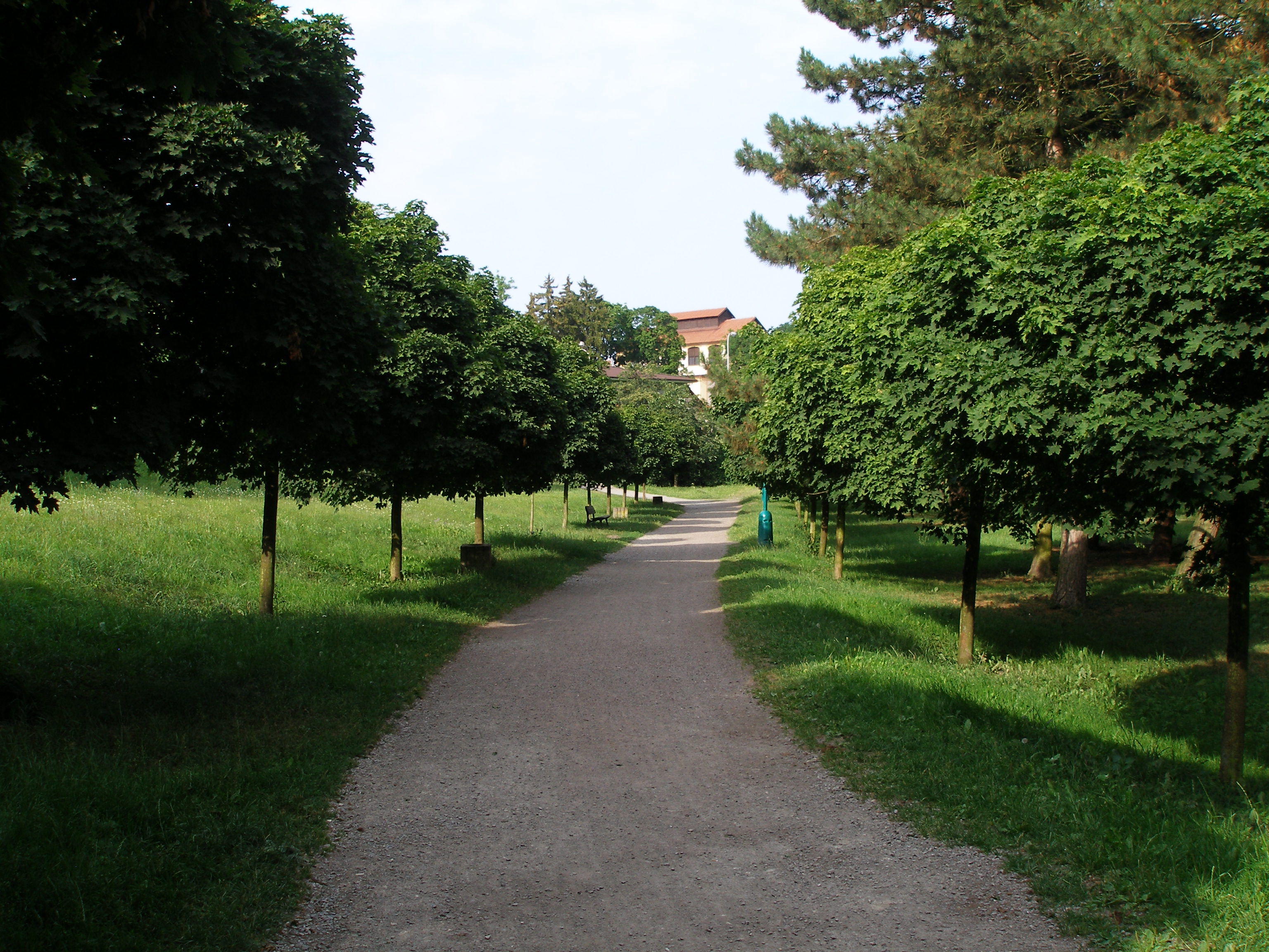 Parková cesta v městském parku Štěpánka v Mladé Boleslavi.